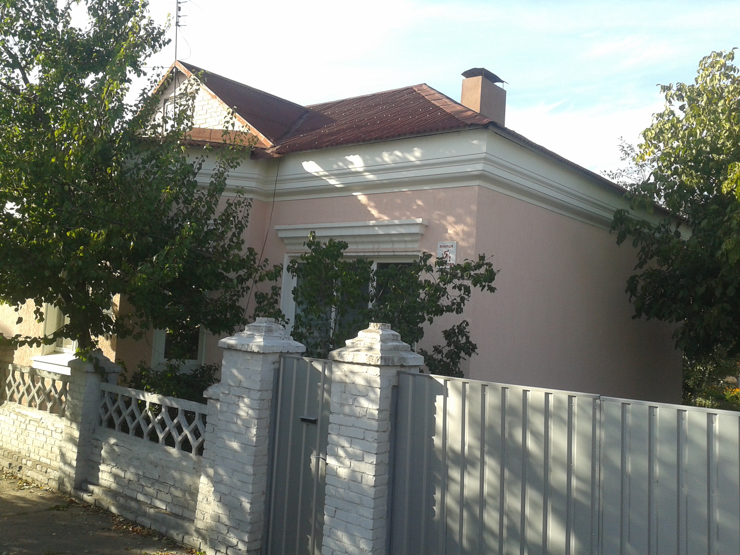 Будинок, де жив Луценко Н.Х. — почесний громадянин міста Олександрія